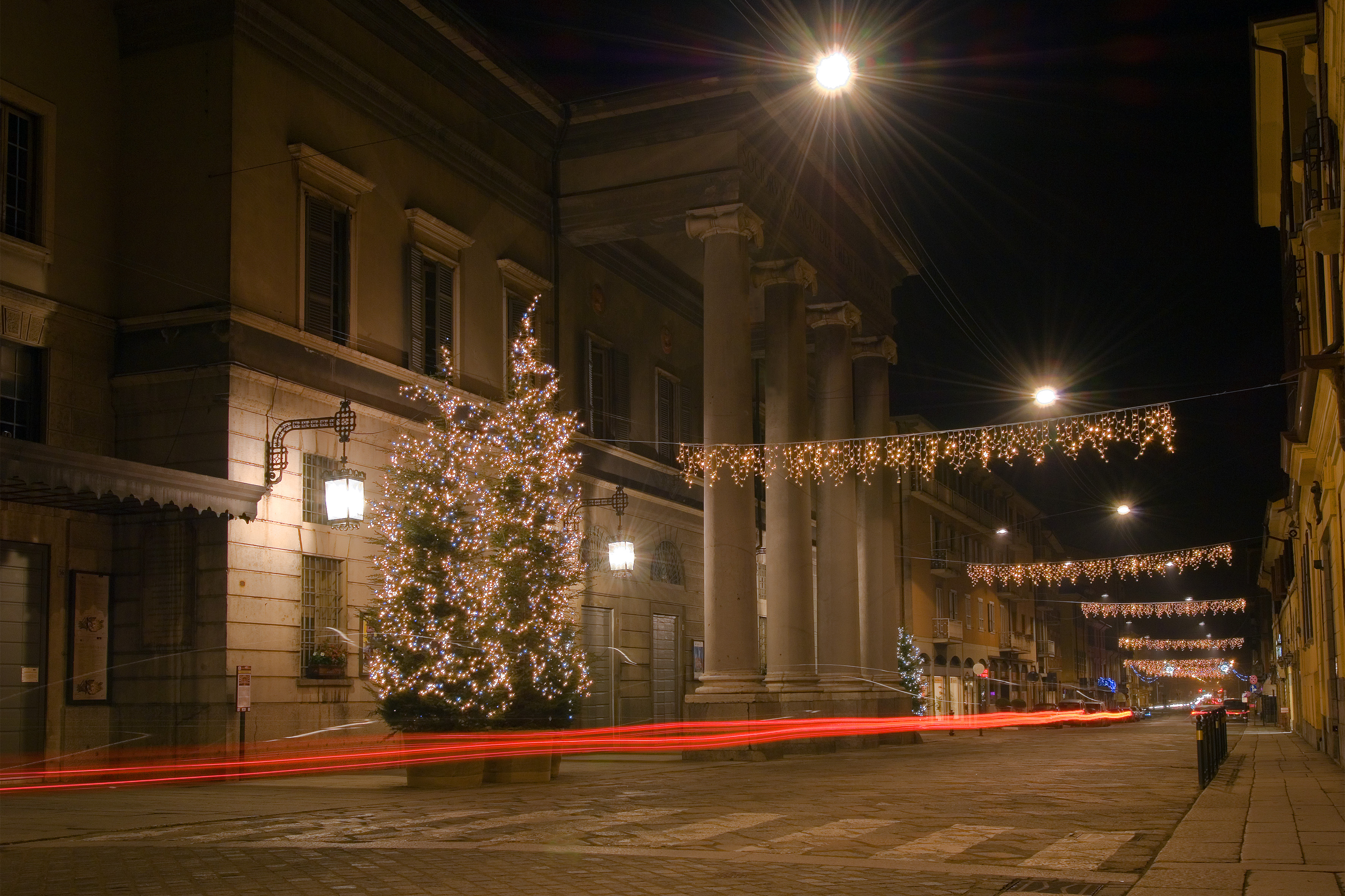 Teatro Ponchielli This is a photo of a monument which is part of cultural heritage of Italy.